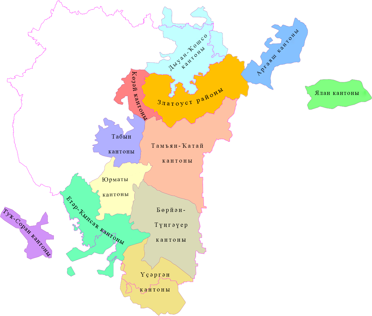 Башҡортса: Бәләкәй Башҡортостан 1919